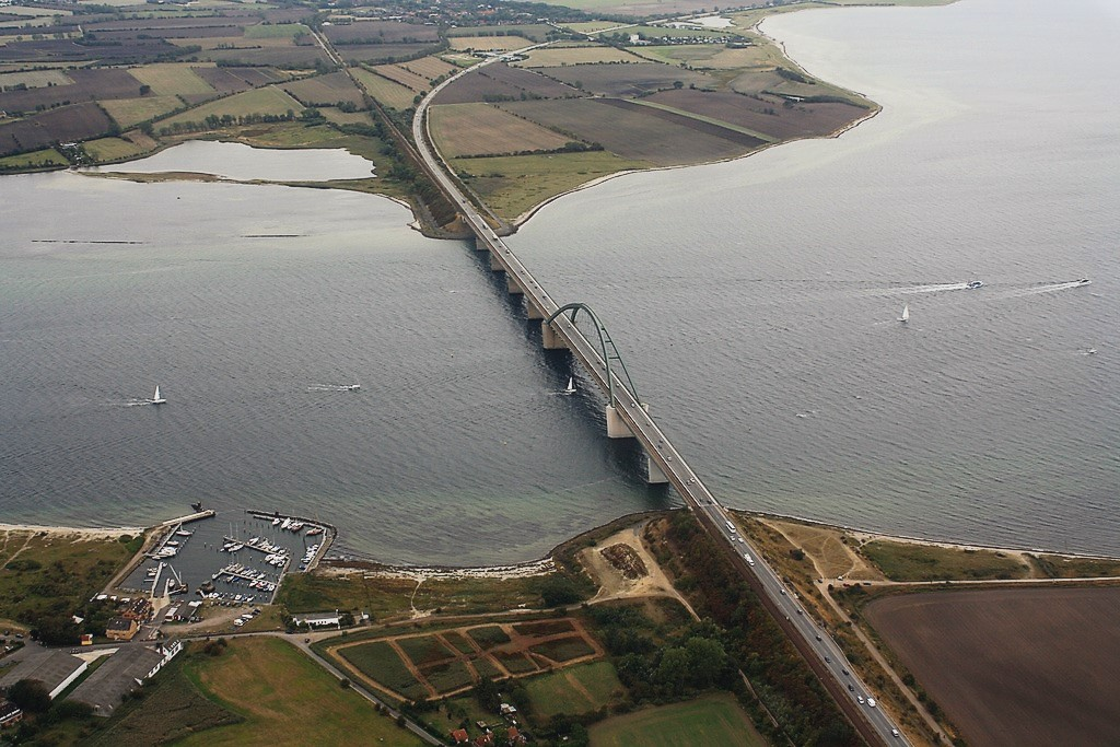 Fehmarn Sund bridge from above. Schleswig-Holstein, northern Germany.